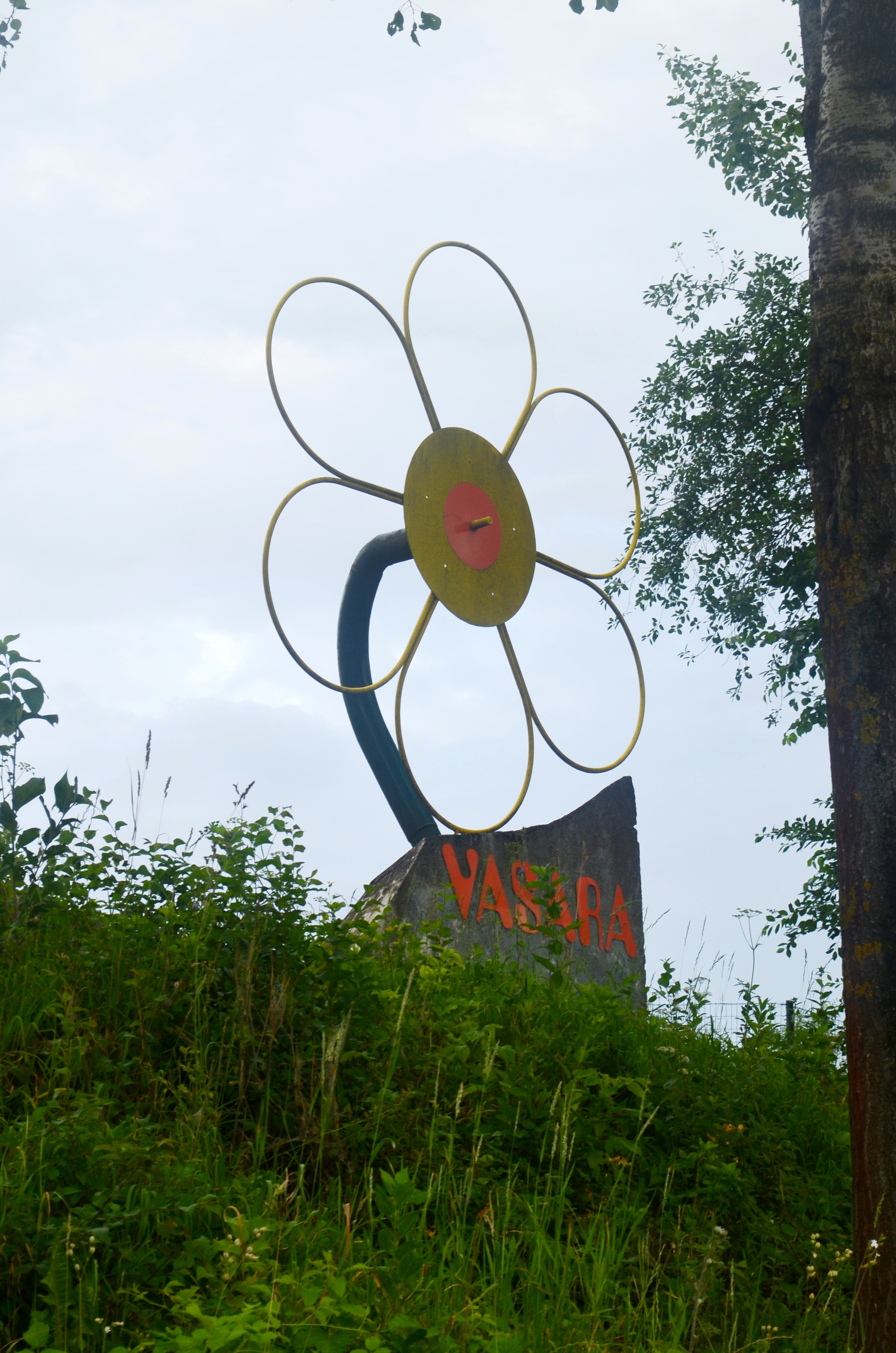 Pašiliai, „Vasaros“ sodų ženklas, Kėdainių raj.